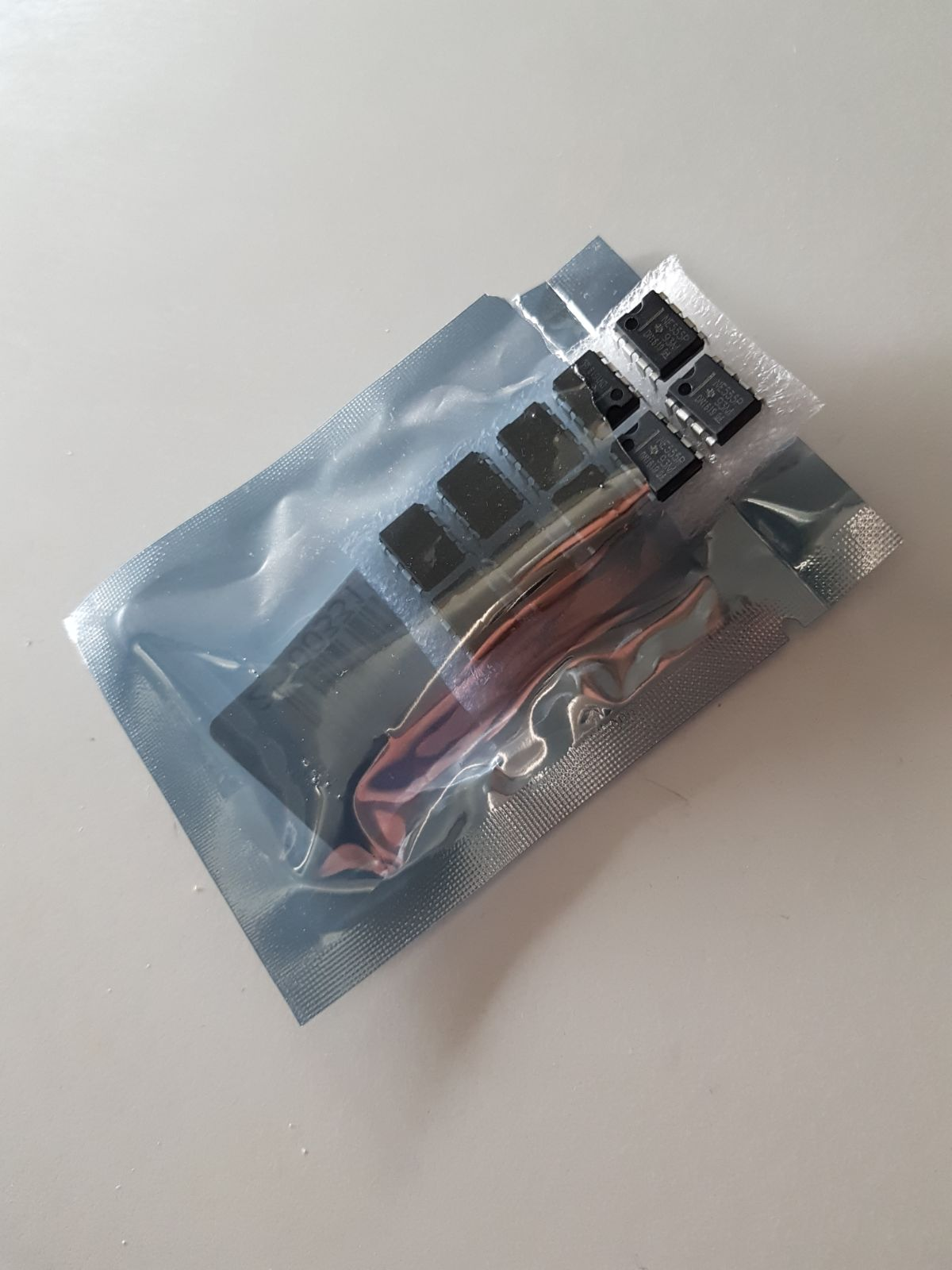 Elektronisten komponenttien kuljetuksessa käytetty ESD-suojattu paketti.